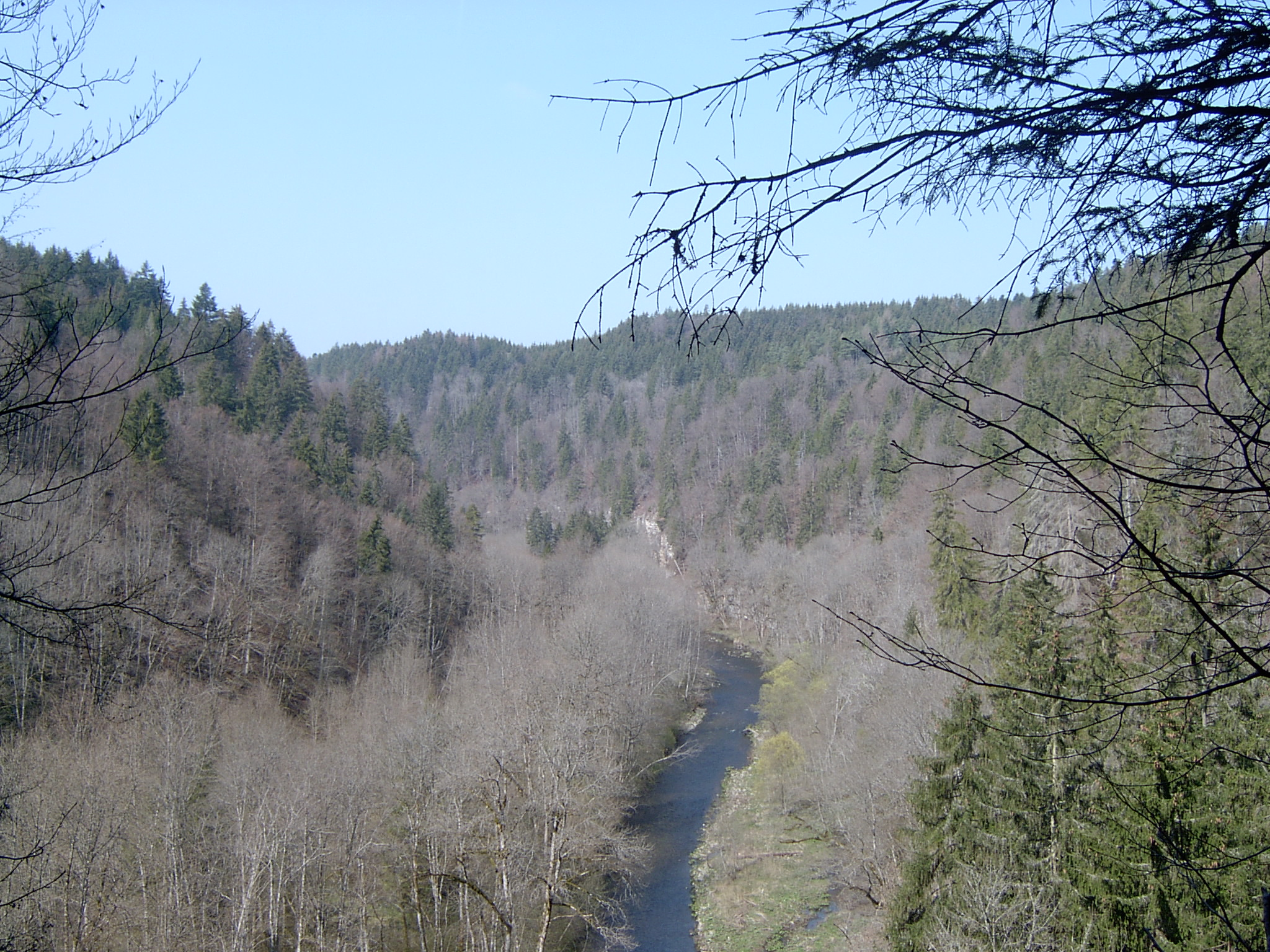 Wutachschlucht, südlich von Reiselfingen im Naturschutzgebiet „Wutachschlucht“